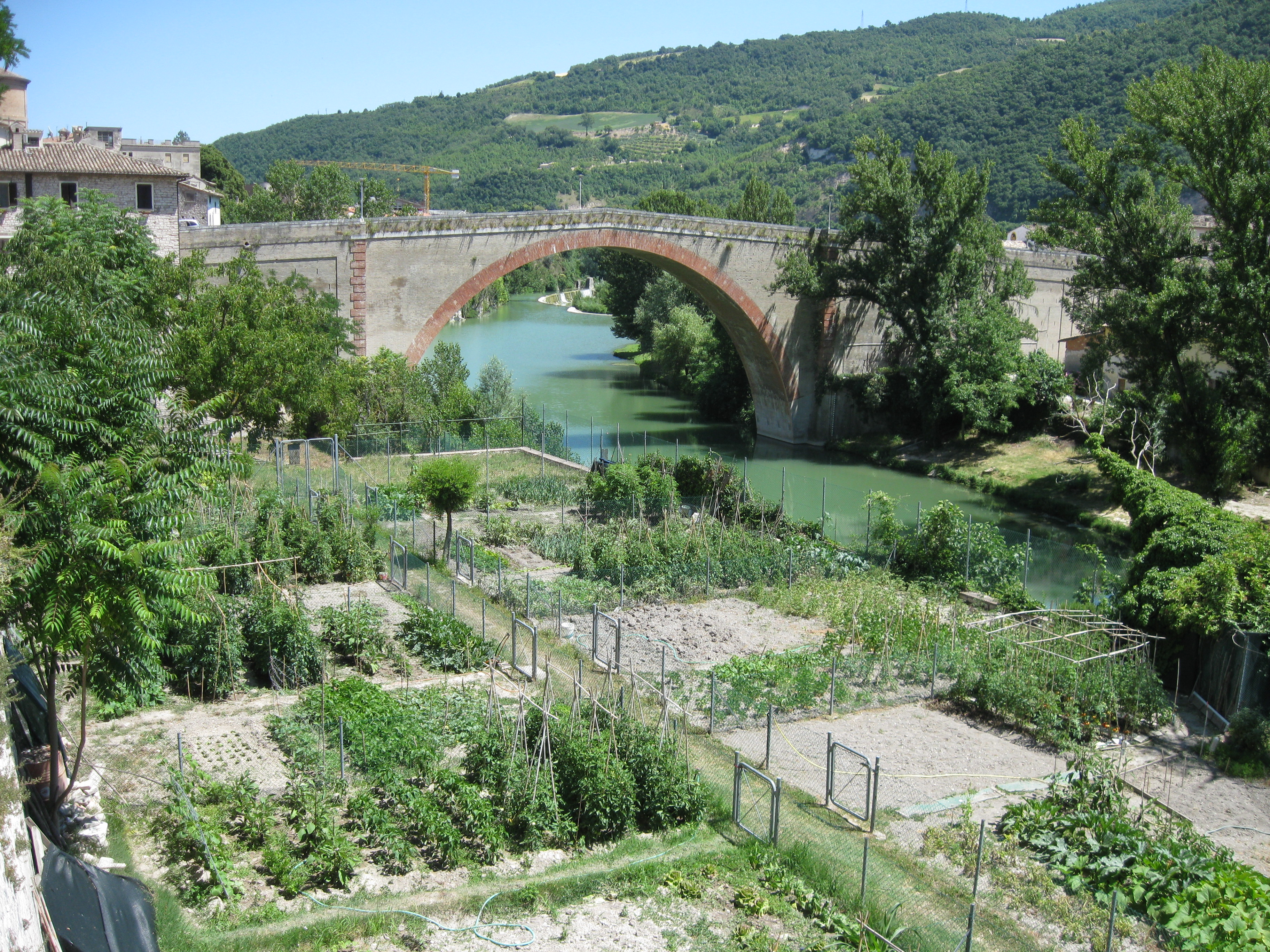 Ponte sul Metauro, Fossombrone, Italien